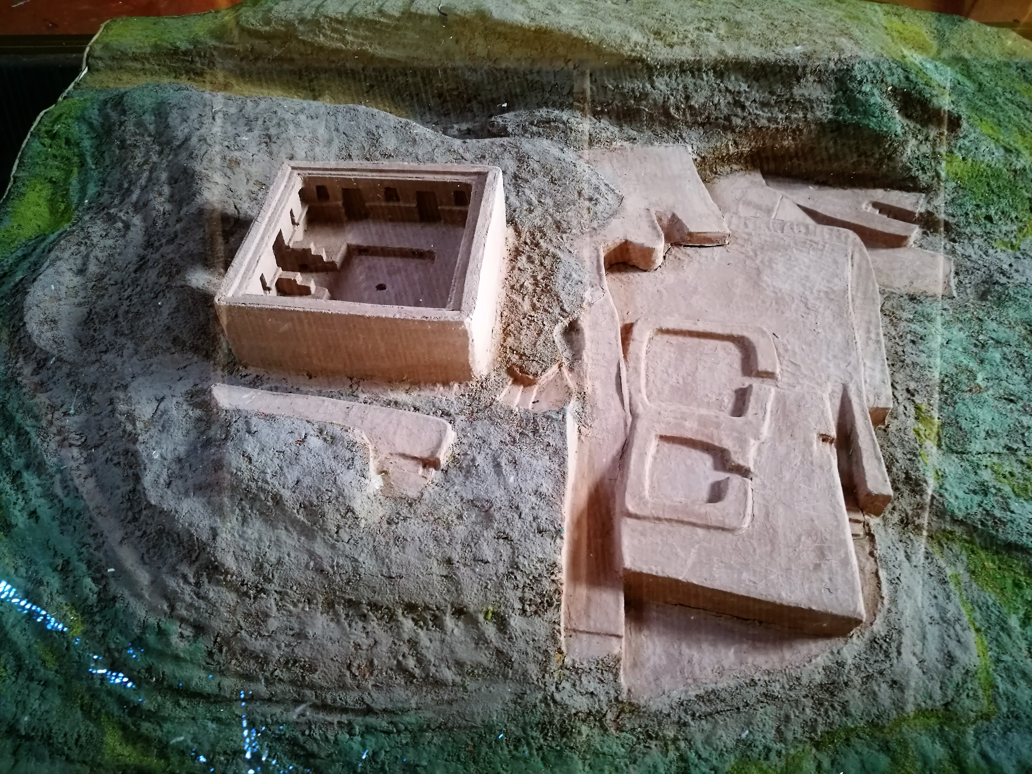 Maquesta del lloc arqueològic de Kotosh del Museu de Kotosh